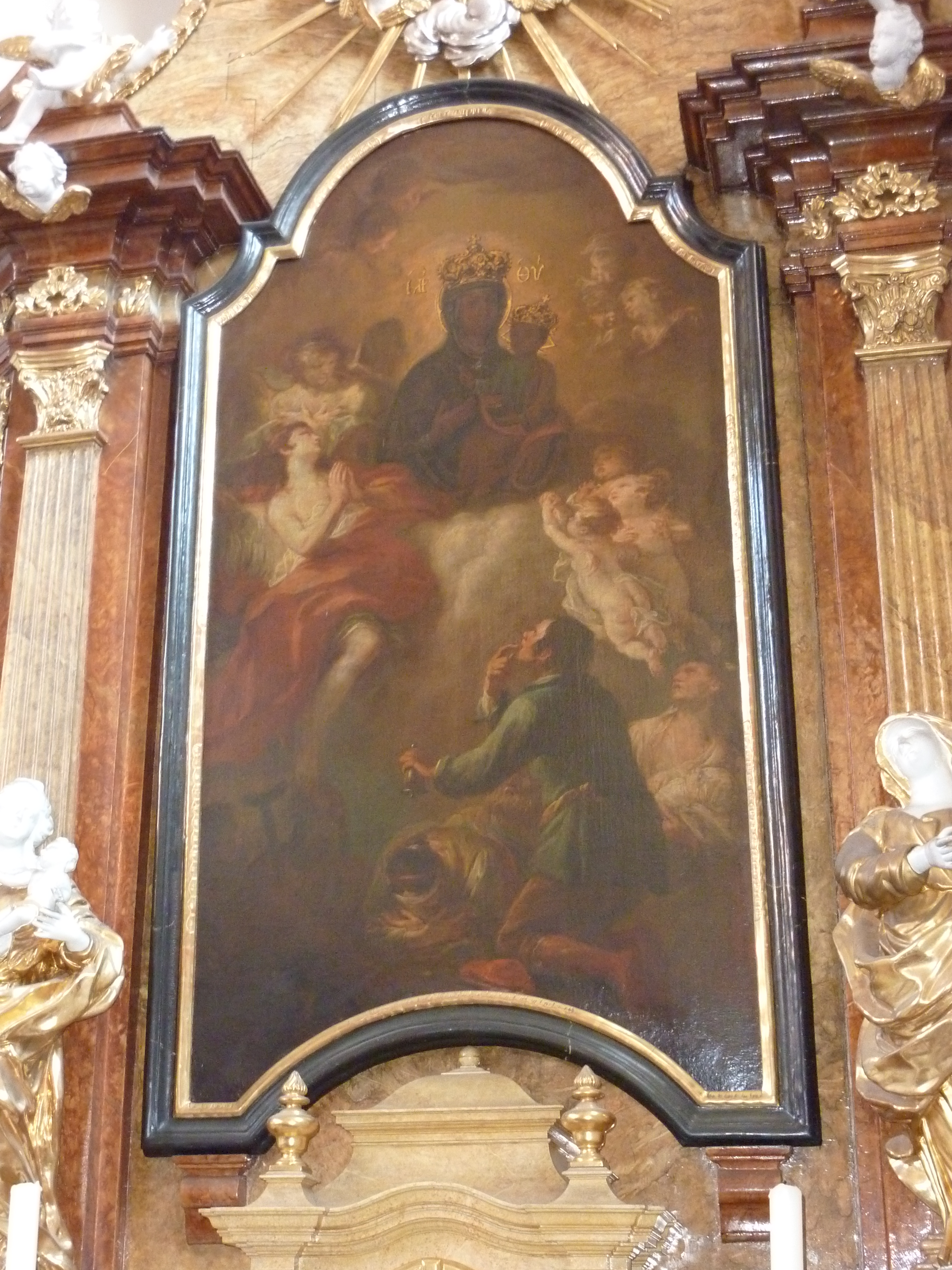 Kath. Filialkirche Marktkirche hl. Georg, Kirchenplatz, Horn, Niederösterreich - rechter Seitenaltar mit Gemälde Schwarze Madonna von Altbrünn (Martin Johann Schmidt, 1779)